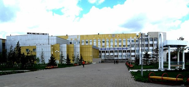 ВТУЗ, КарГИУ, карагандинский индустриальный университет, университет Темиртау. Корпус Б